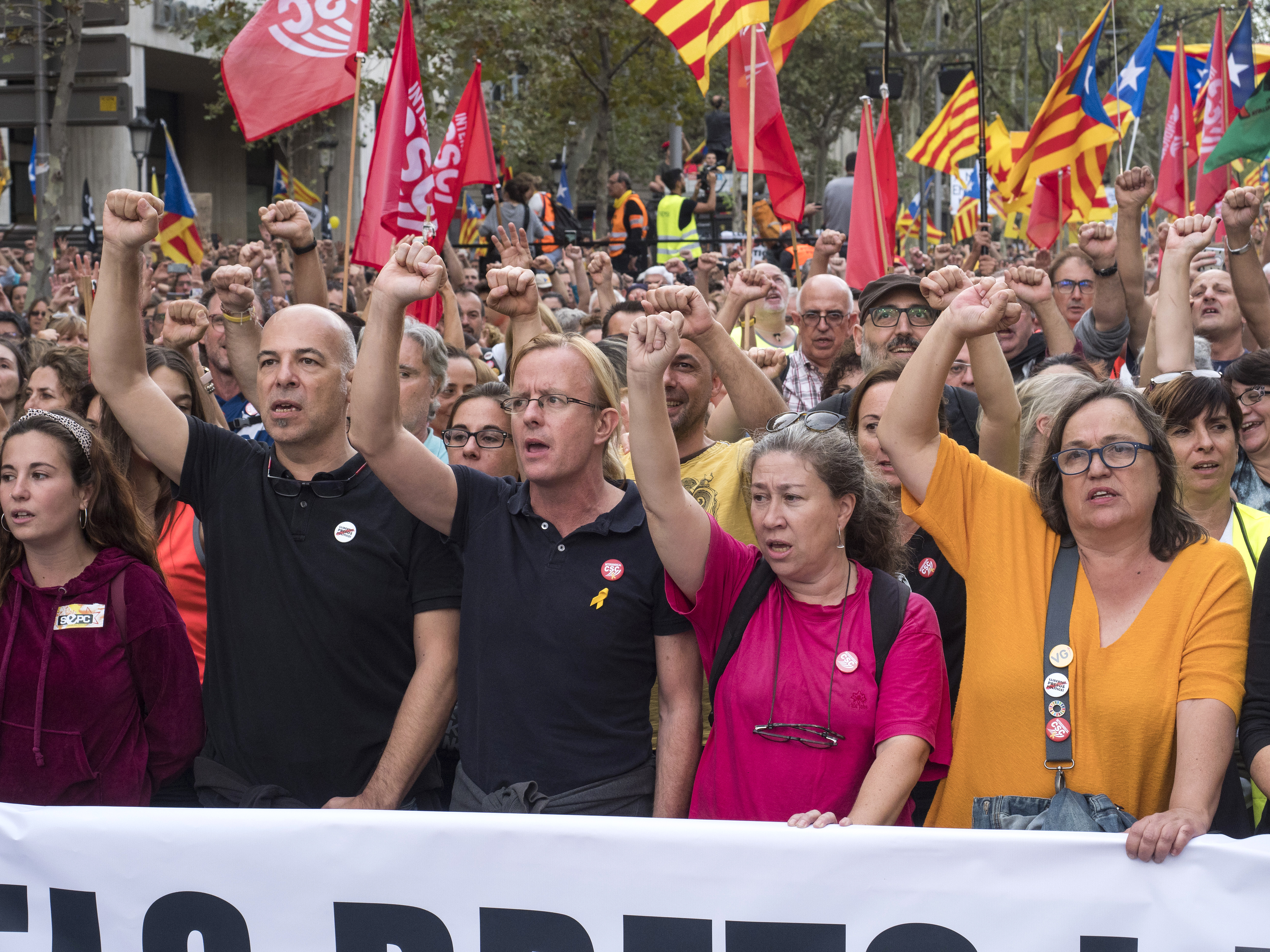 18 octubre de 2019 Aturada de país "Pels drets i les llibertats" Vaga general. ©Dani Codina/Òmnium